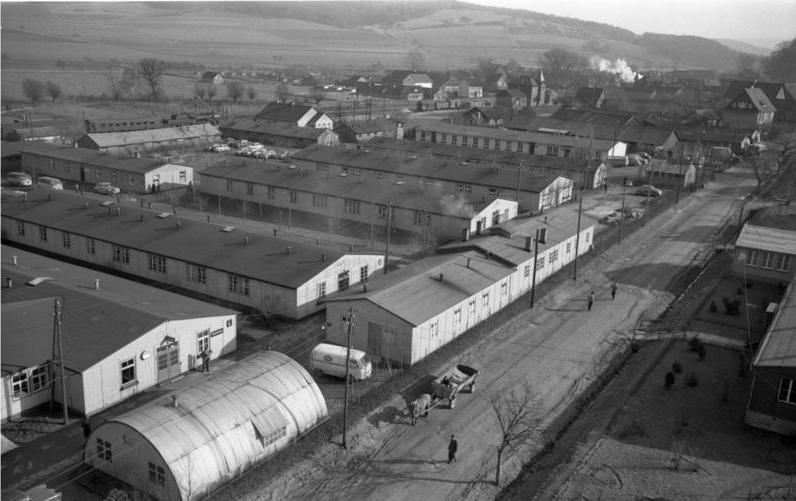 Lager Friedland Ankunft der Wissenschaftler aus Sochumi (Lageraufnahmen und Ankunft von Aussiedlern aus Polen), 12. Februar - 16. Februar 1958